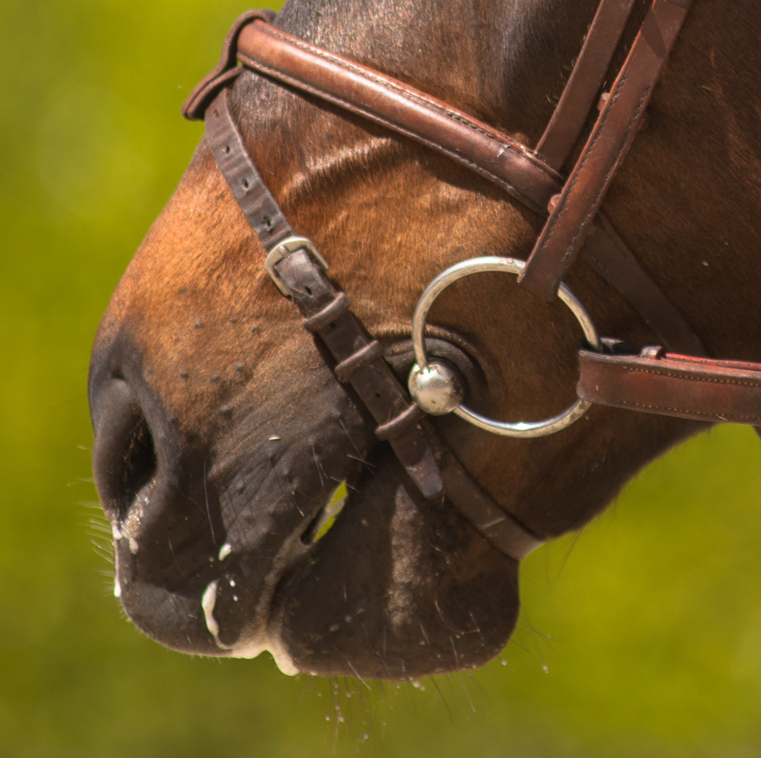 Détail sur la muserolle combinée. photo prise par Ludovic Péron au haras national suisse